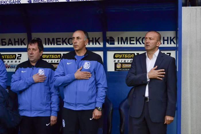 Роман Григорчук 21 квітня 2014 року під час матчу із дніпропетровським Дніпром.